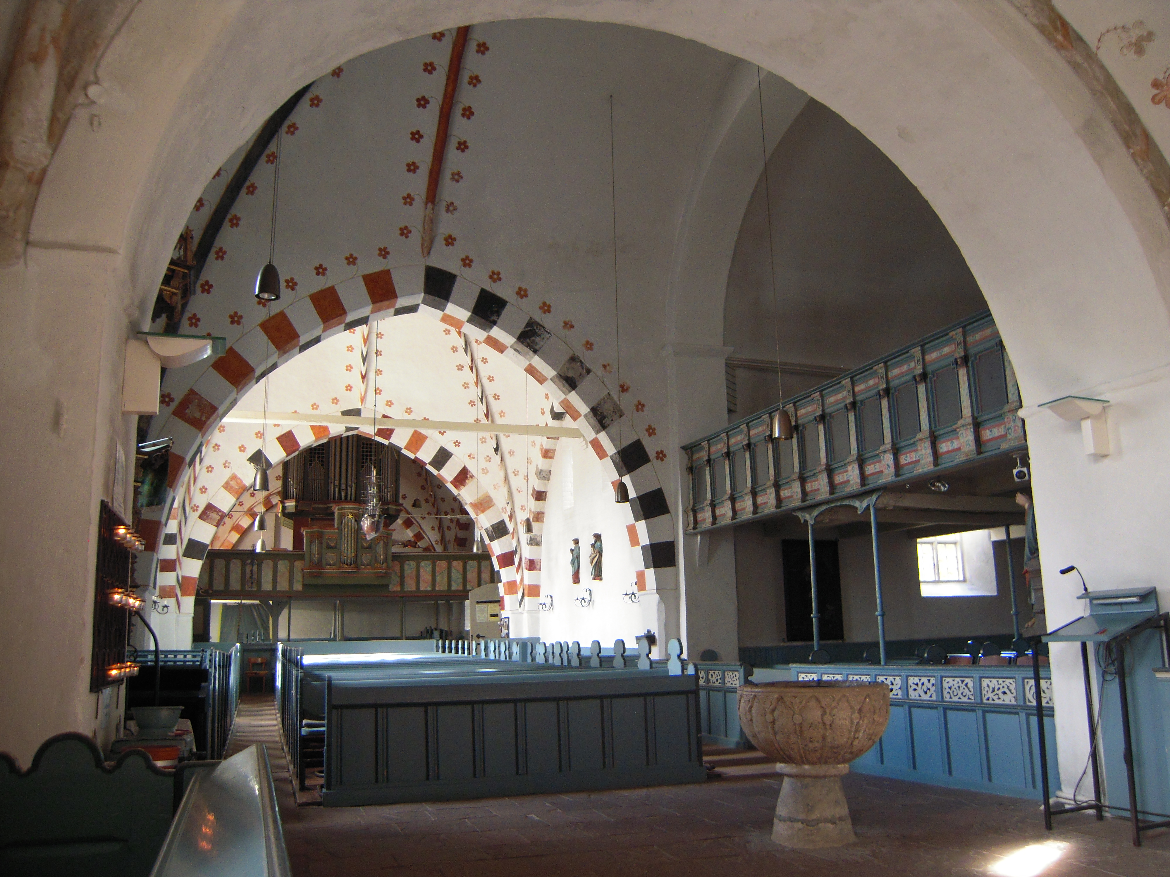 Innenraum der Kirche St. Nicolai in Wyk auf Föhr